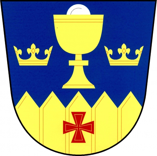 Znak, Křenov , okres Svitavy